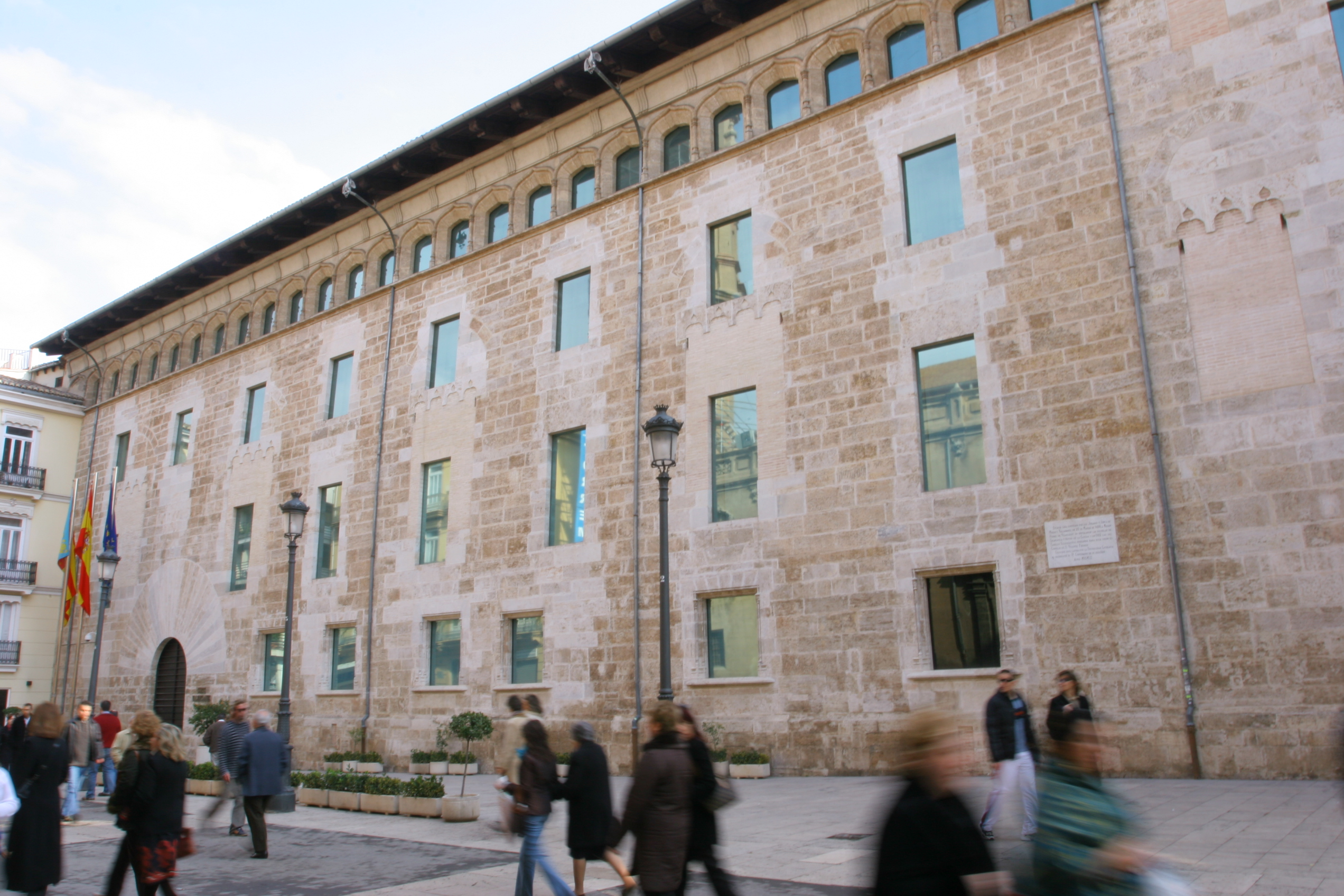 Façana de Les Corts del País Valencià. Antic Palau dels Borja.